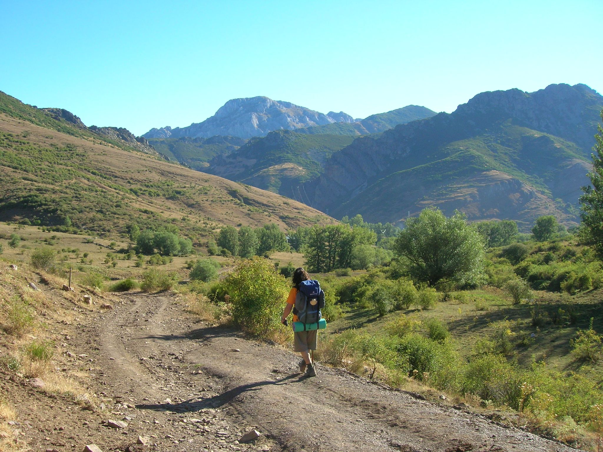 Acercandonos a Villasimpliz